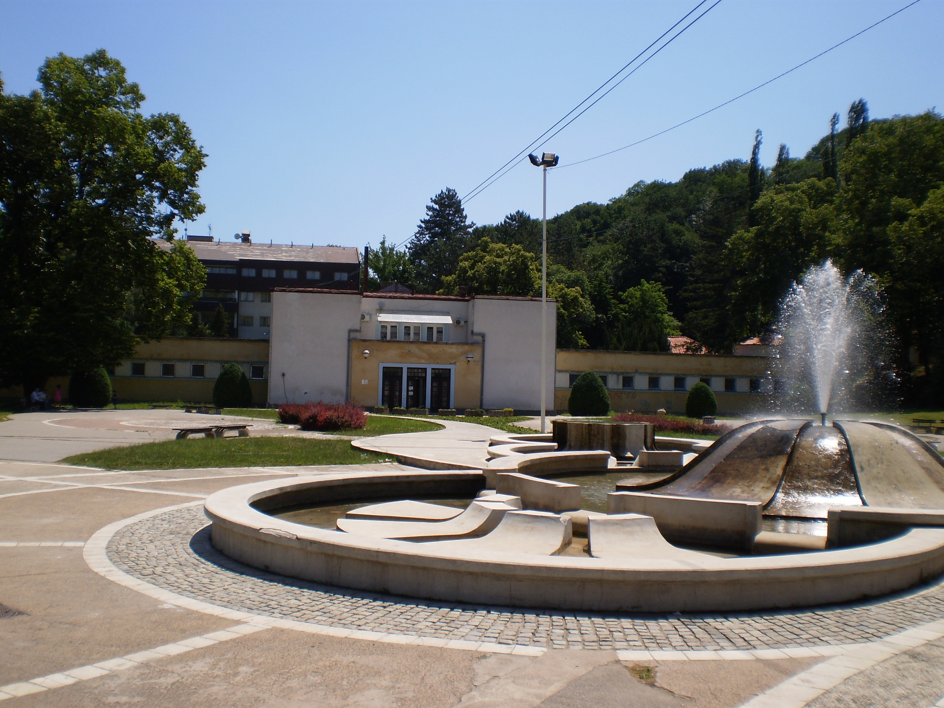 Niška Banja, centralno banjsko kupatilo. Autor dr Milorad Dimić, Niš, Serbia 17. jun 2012.